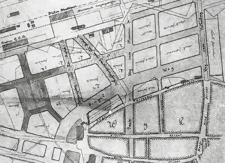 "Plan tot aanleg van straten op de vestingterreinen te Wijk". Stratenplan uit 1882 van de aan te leggen Stationsbuurt in Maastricht door ir. A. Brender à Brandis. Collectie Gemeente Archief Maastricht.